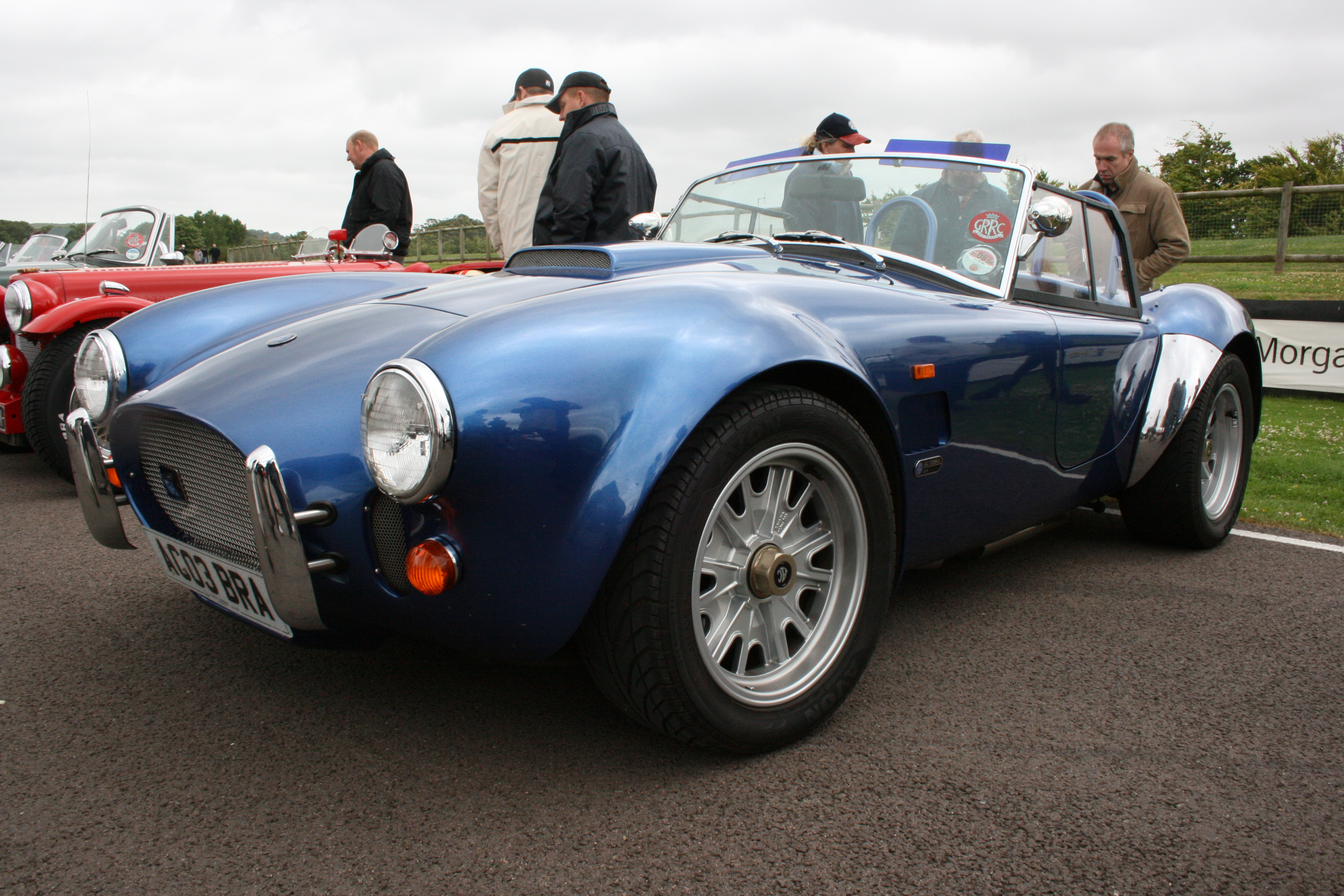 AC Cobra CRS